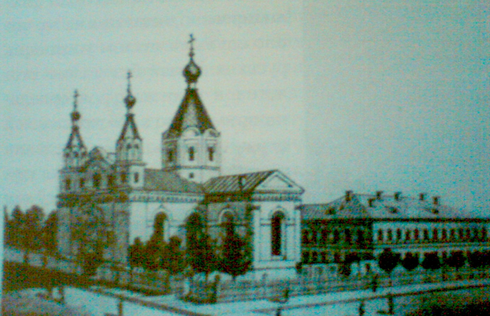 Cerkiew Czterech Świętych Metropolitów Moskiewskich w Kownie, urządzona przez Rosjan w dawnym kościele dominikanów w Kownie. Stan sprzed 1919, następnie została ponownie zaadaptowana na Kościół